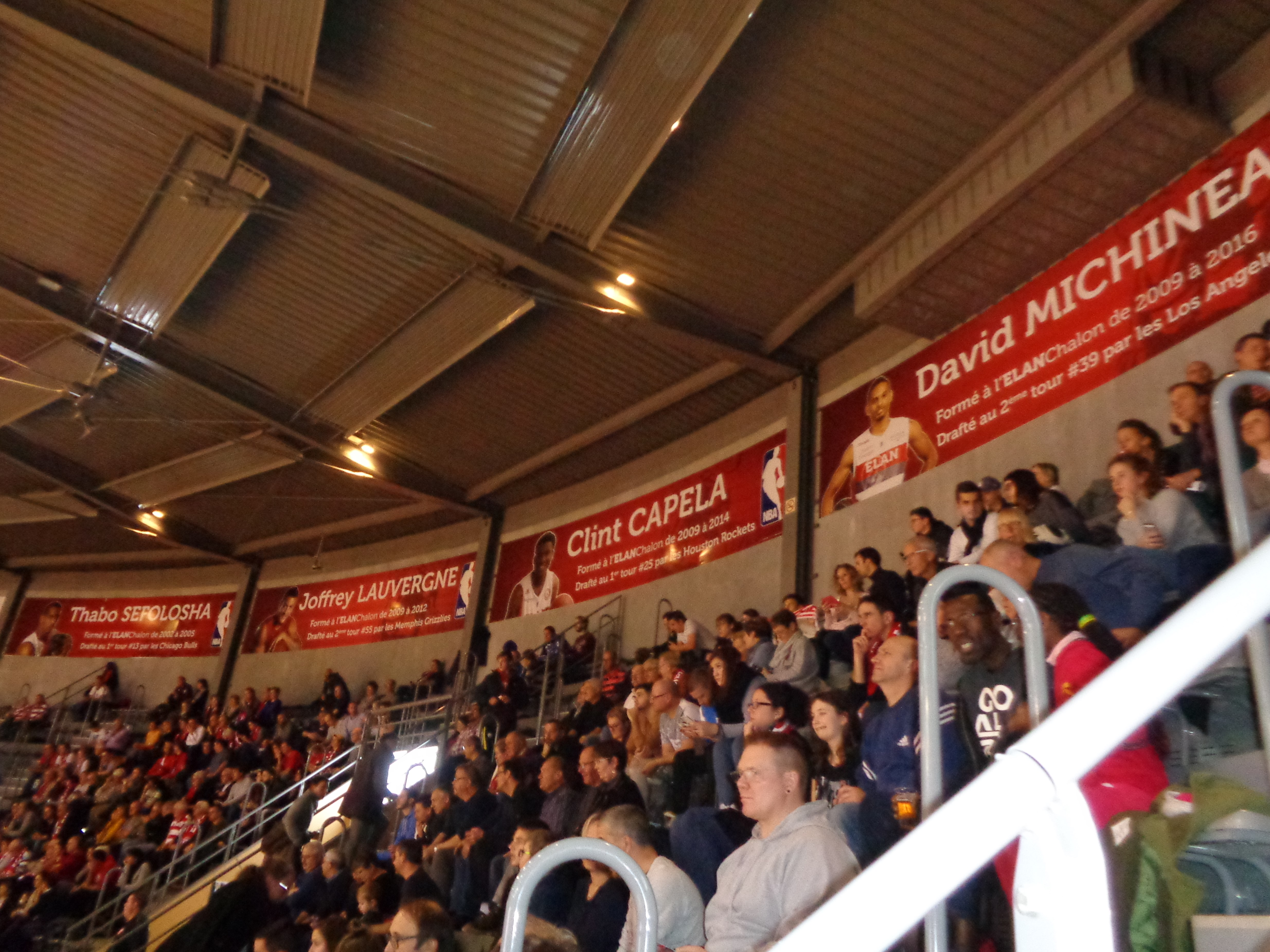 Pancarte des joueurs qui ont été formé à l'Elan Chalon et qui évolue ou ont un rapport avec la NBA.